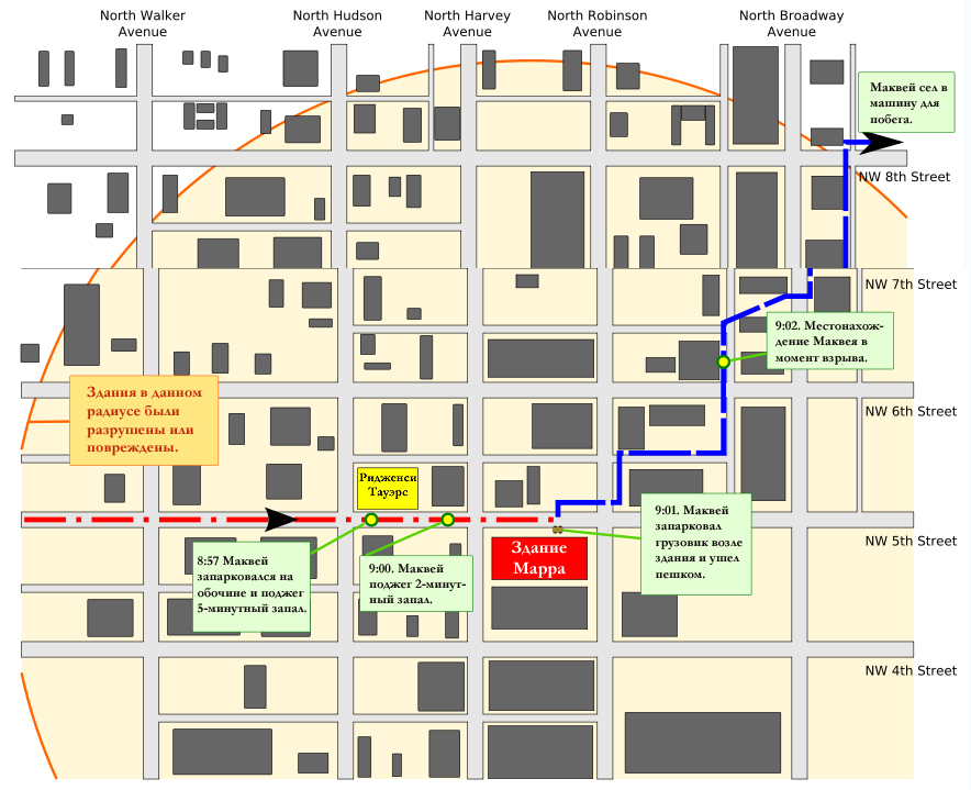 Карта передвижения Тимоти Маквея в арендованном грузовике компании Ryder (красная пунктирная линия) и побег пешком (синяя пунктирная линия) в день теракта в Оклахома-Сити 19 апреля 1995. Файл является русифицированной версий оригинального файла, заимствованного с англоязычного викисклада. Информация об источнике внизу.